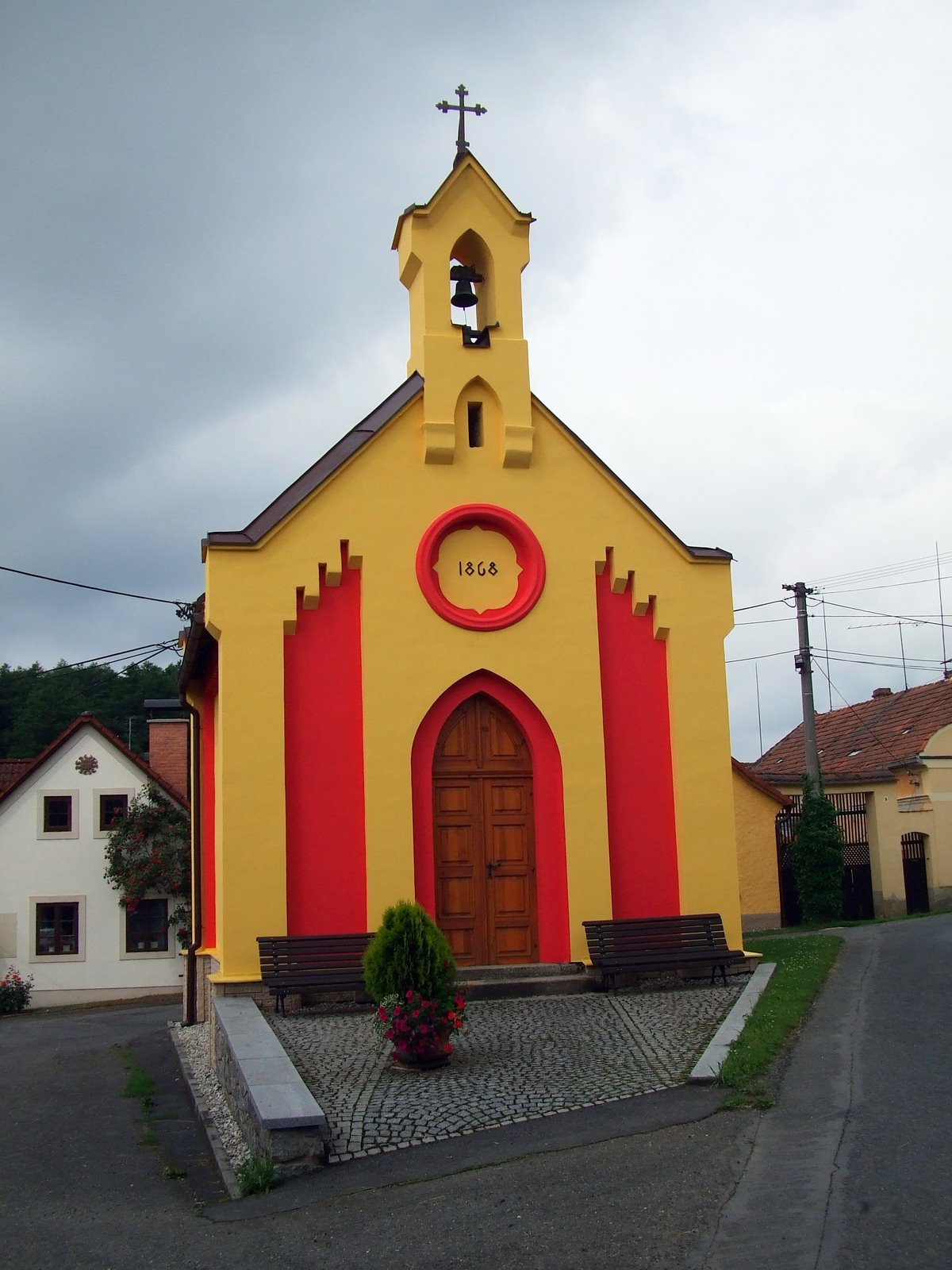 Únějovický kostel